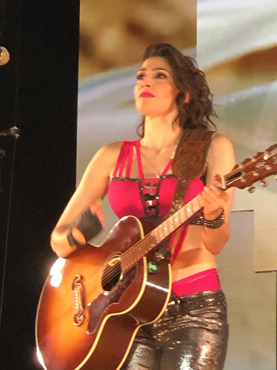 Ha*Ash Auditorio Nacional México 11 de Noviembre de 2018